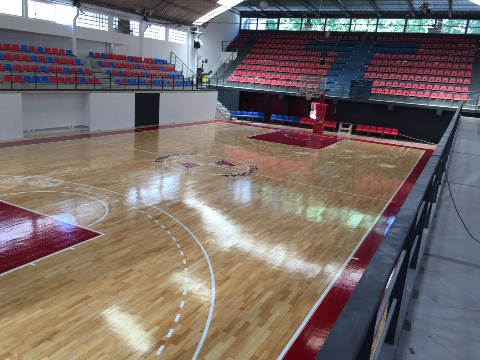 Estadio Club Trouville - Montevideo Uruguay